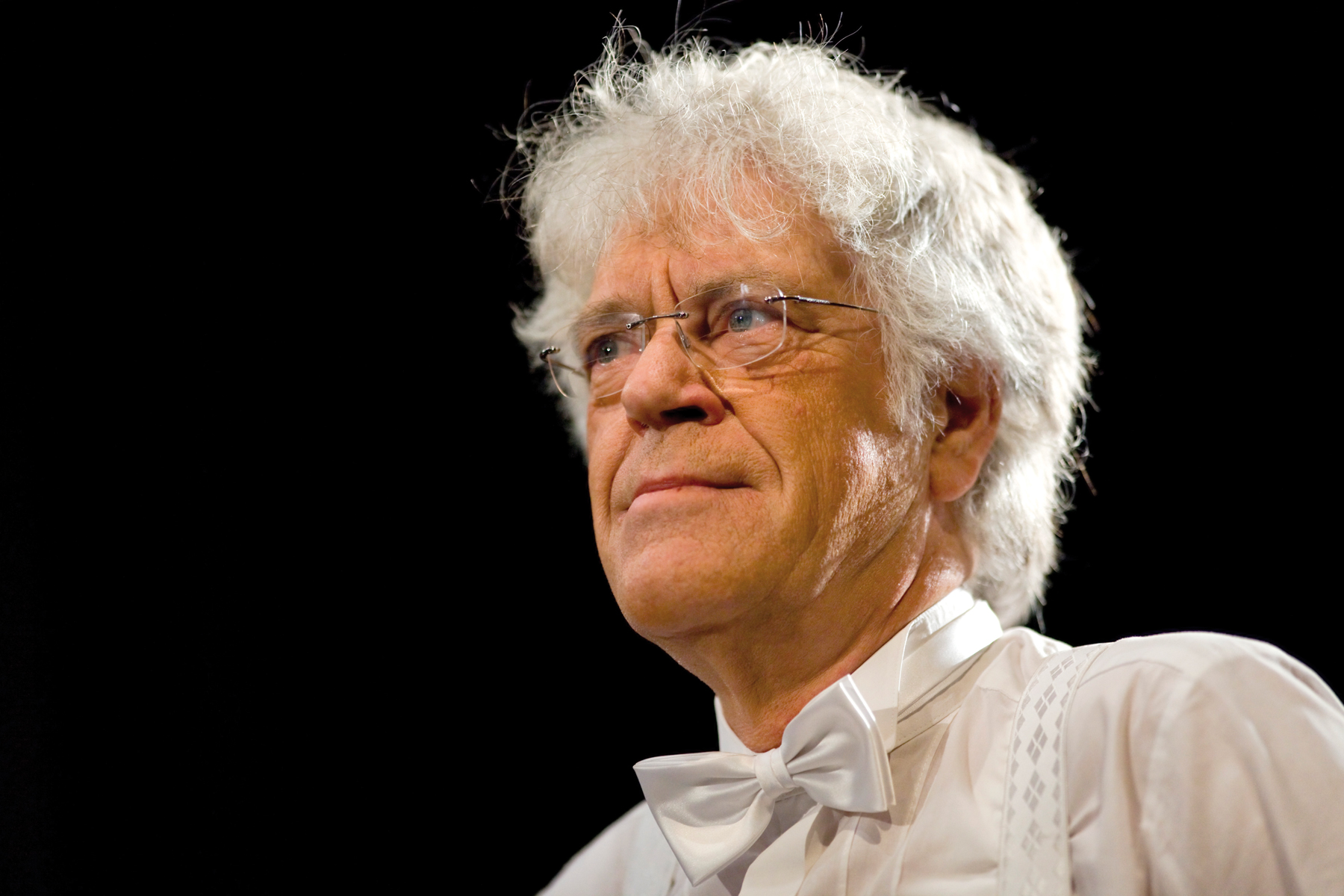 Bild vom Dirigenten Christoph Wyneken